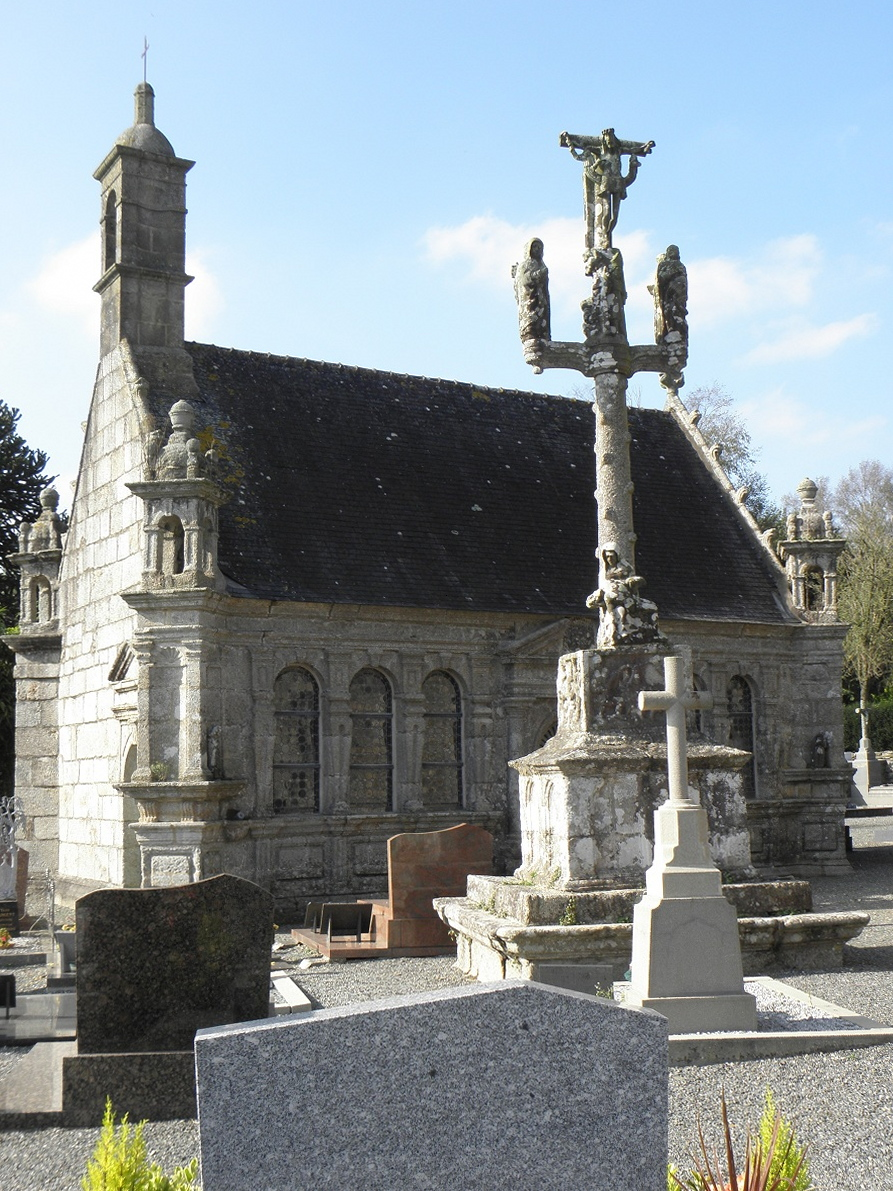 Ossuaire et calvaire de Saint-Servais (29).Le calvaire date de 1630Site Nos monuments